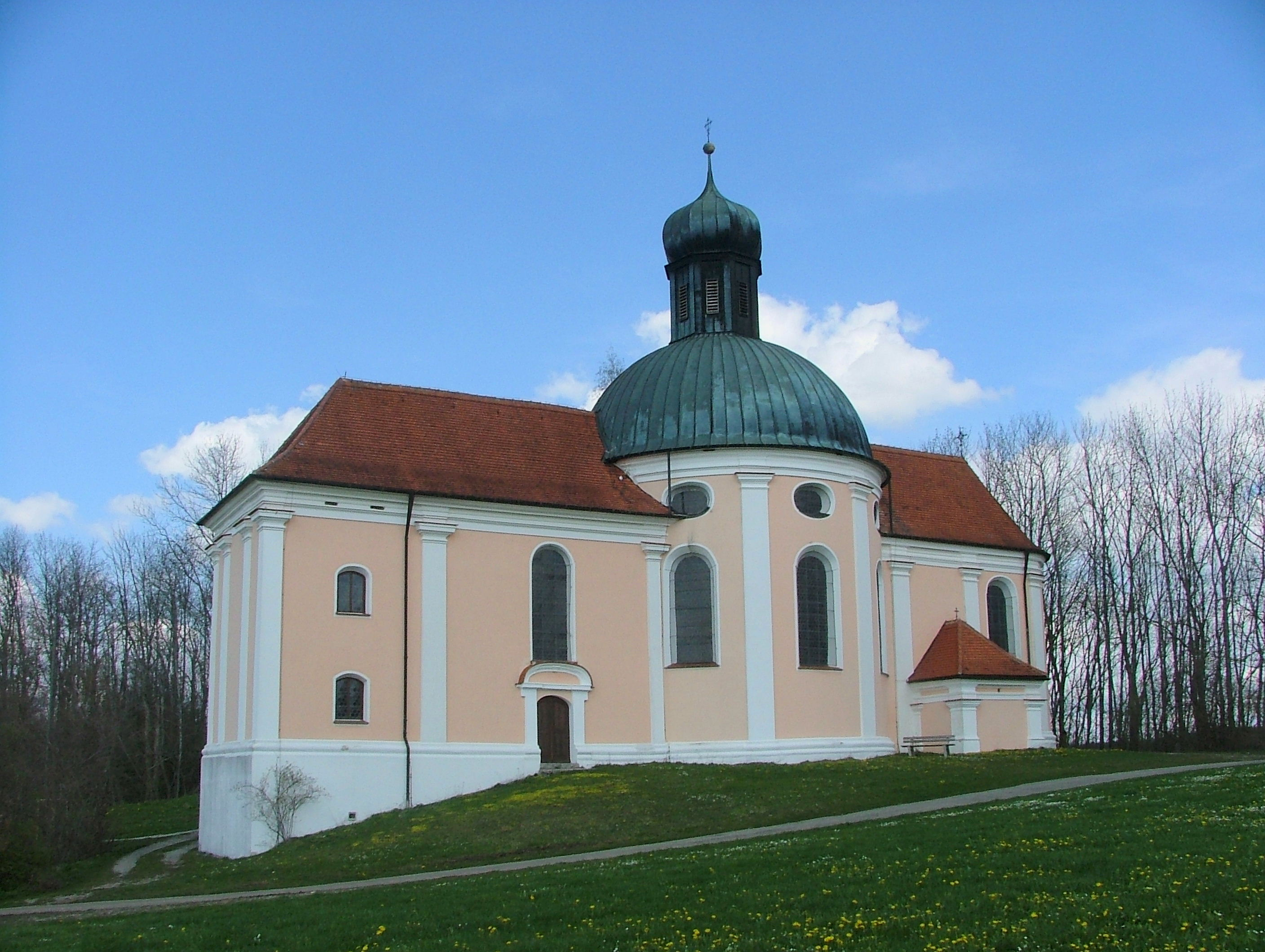 Eggenthal